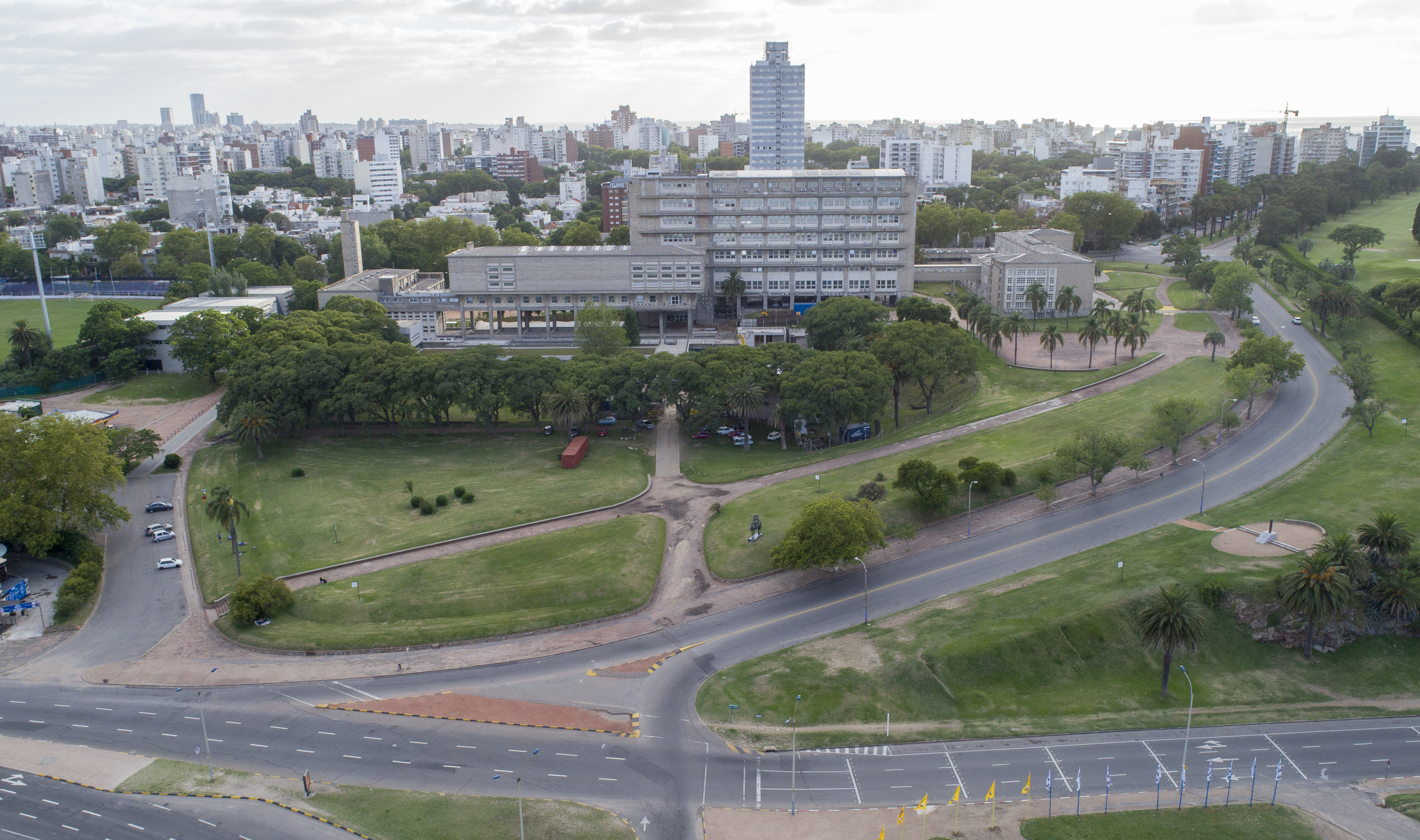 Facultad de Ingeniería de la UDELAR, Montevideo, Uruguay